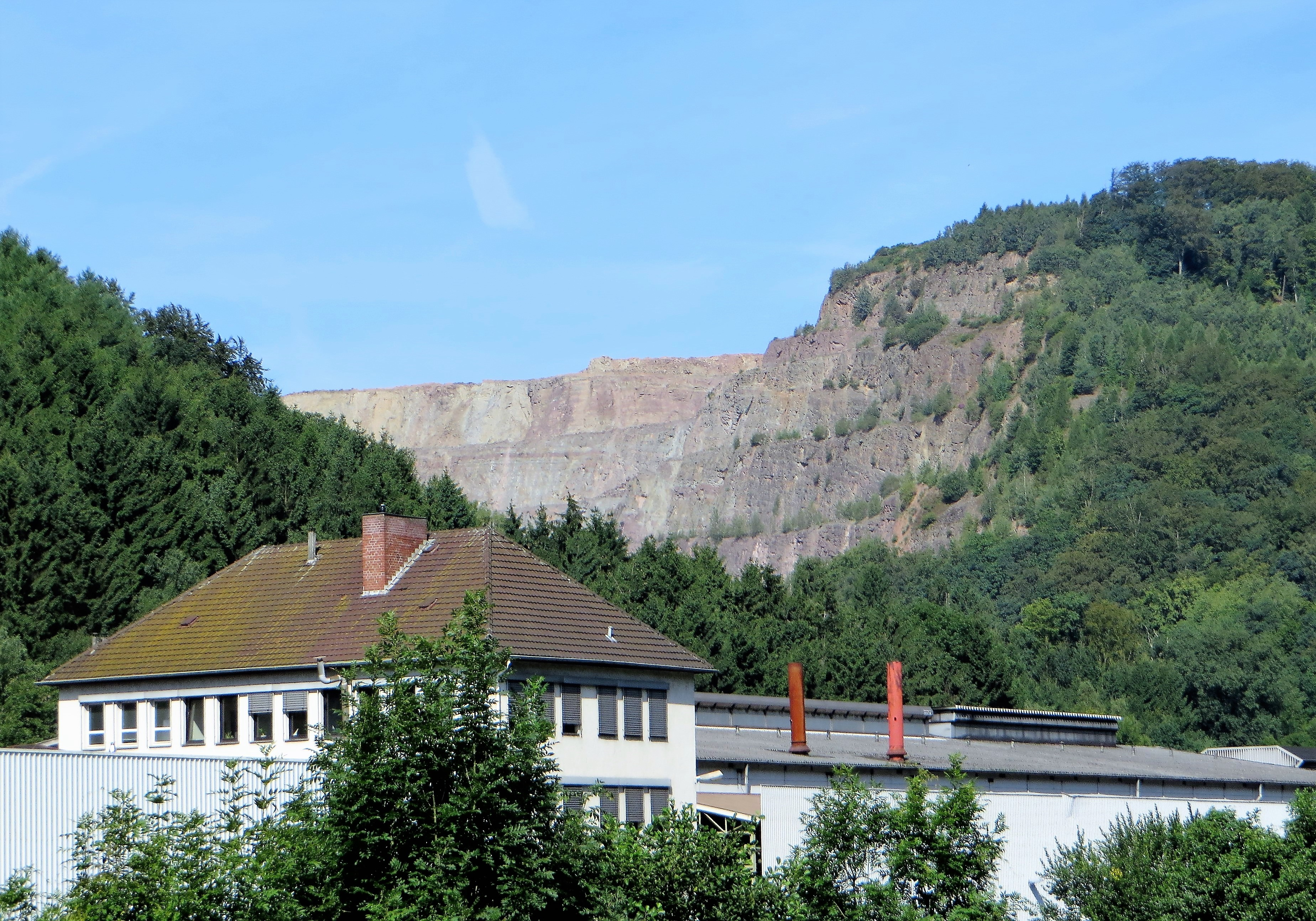 Grauwacke-Steinbruch Ambrock der KSV Kies und Splitt GmbH Rhein-Ruhr in Hagen-Ambrock, Im Hamperbach 7. Blick von der Delsterner Straße (B 54) auf den am Rande des Volmetals gelegenen riesigen „Kösterschen“ Steinbruch. Geologisch betrachtet sind es mitteldevonische Brandenberg-Schichten aus der Zeit vor etwa 400 Millionen Jahren, die auch wissenschaftlich interessant sind. Hier wurde ein vielfältiger und unbekannter Bestand an Fossilien von frühen Landpflanzen und auch Panzerfischen gefunden. Der Steinbruch liegt im Landschaftsschutzgebiet „Eilper Berg/Langenberg“.